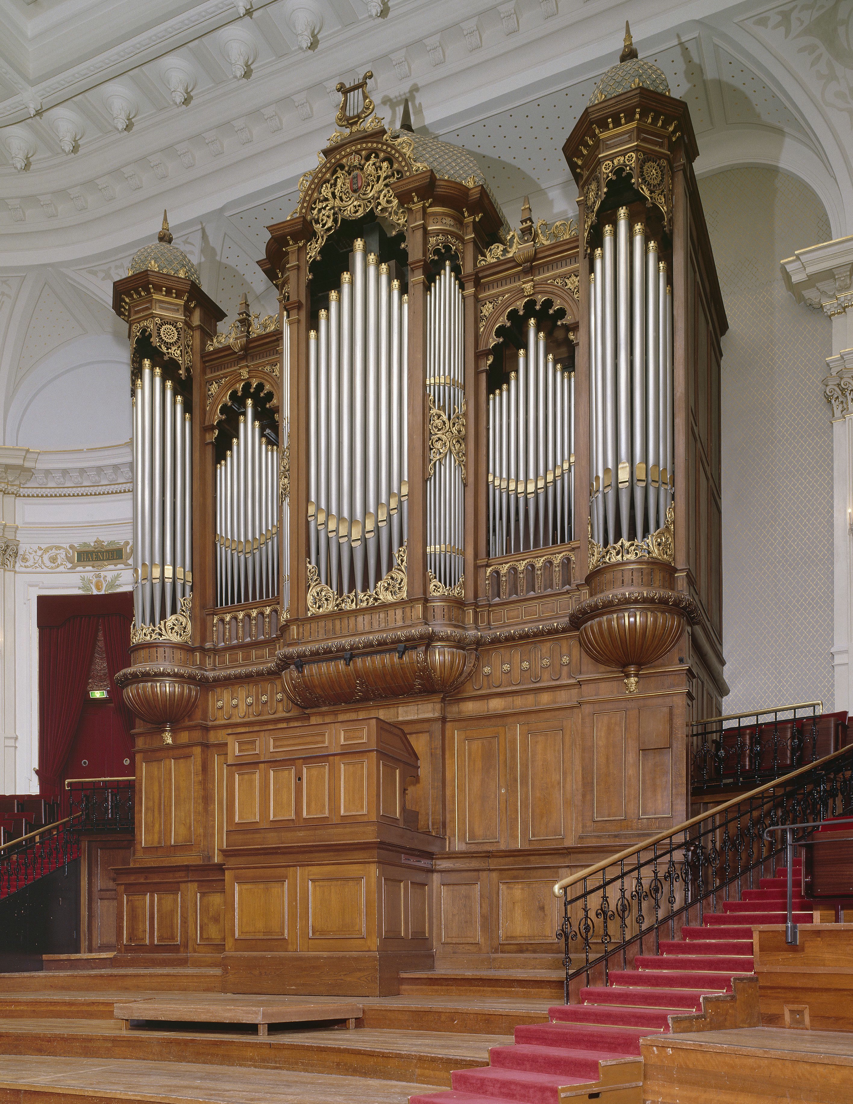 Concertgebouw: Interieur, aanzicht orgel, orgelnummer 1815 (opmerking: Gefotografeerd voor Het Historische Orgel in Nederland 1886-1894, bladzijde 207)